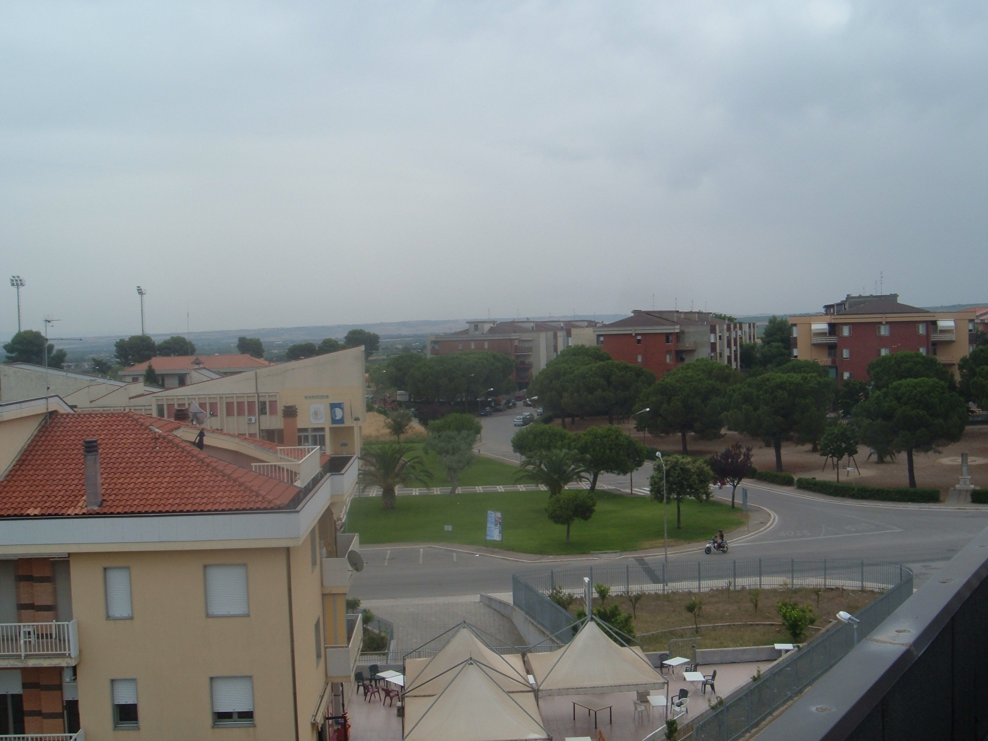 Campomarino